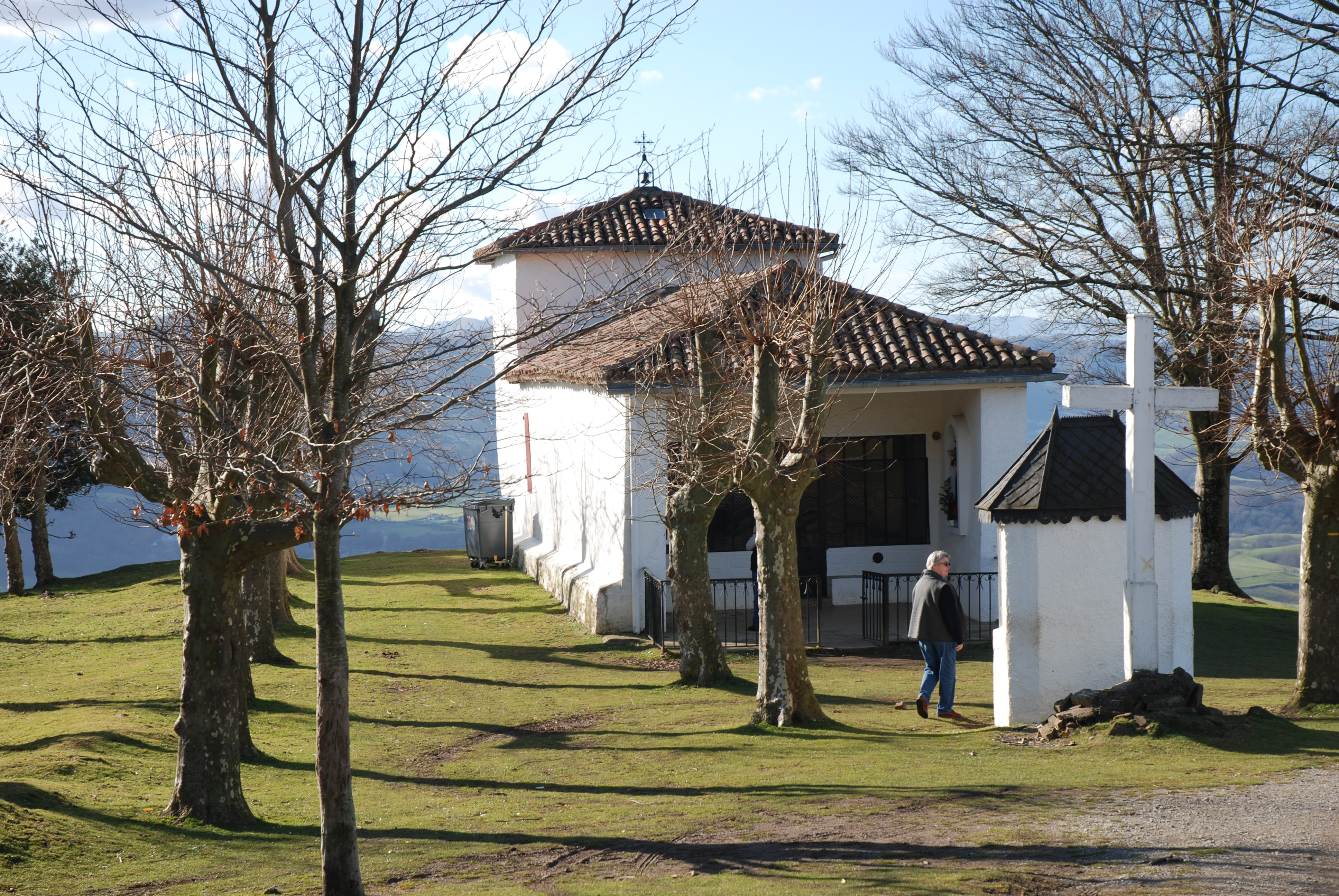 Ainhoa, la chapelle Notre-Dame-d'Aubépine.